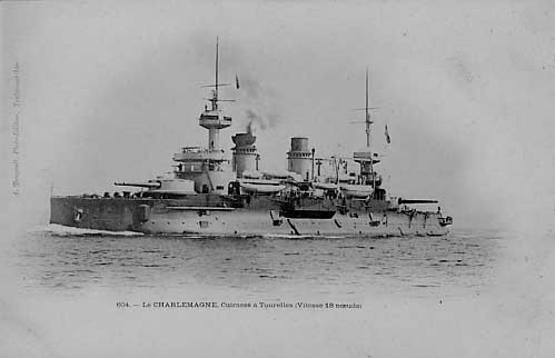 le cuirassé Charlemagne